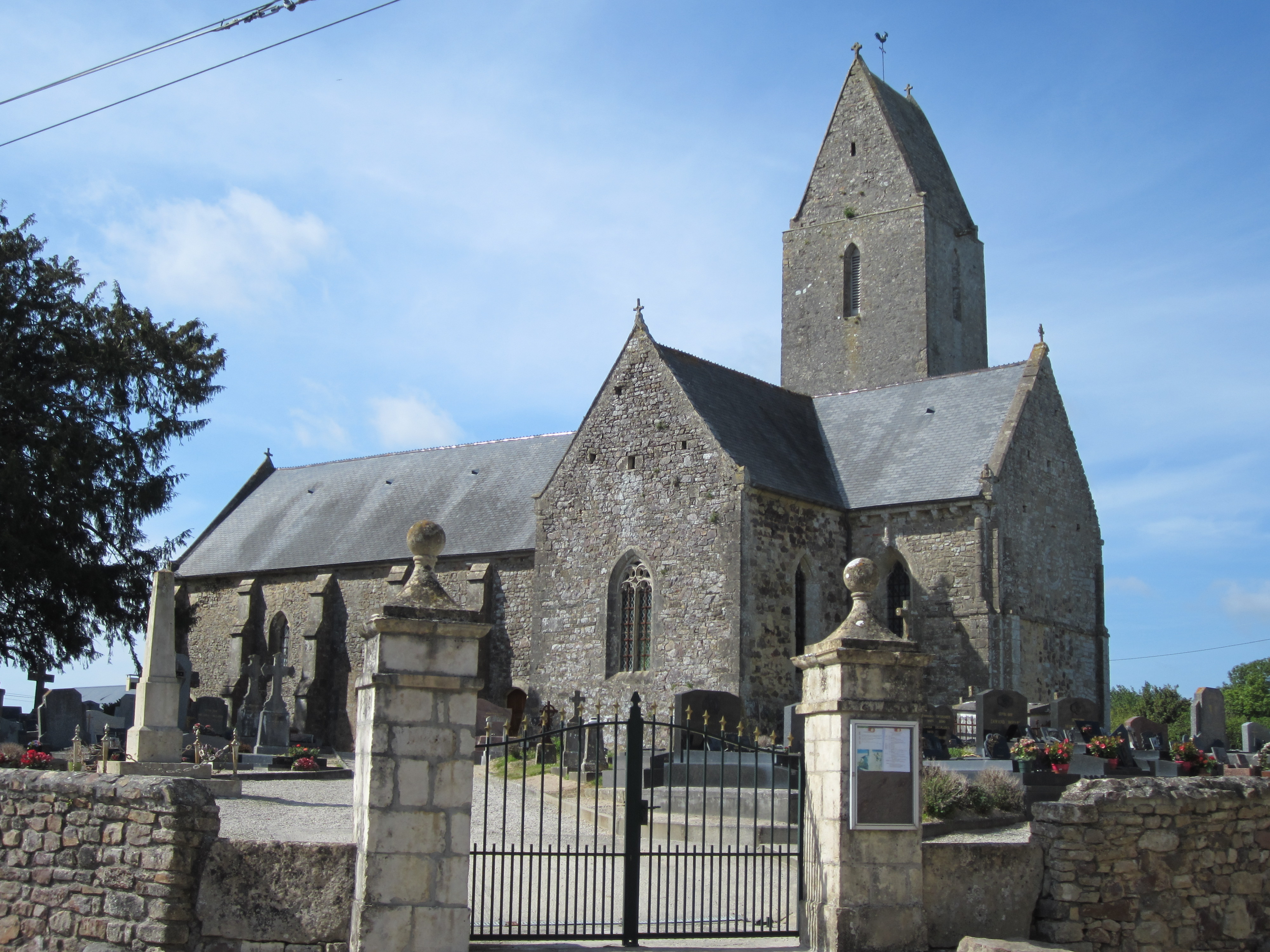 Église Notre-Dame de Sortosville-Bocage .